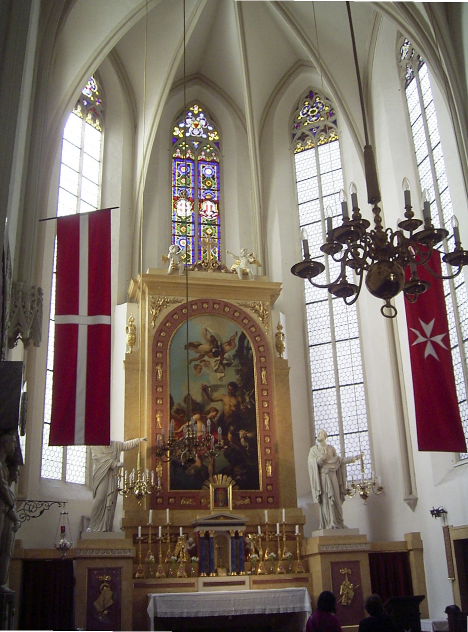 Malteserkirche Vienna